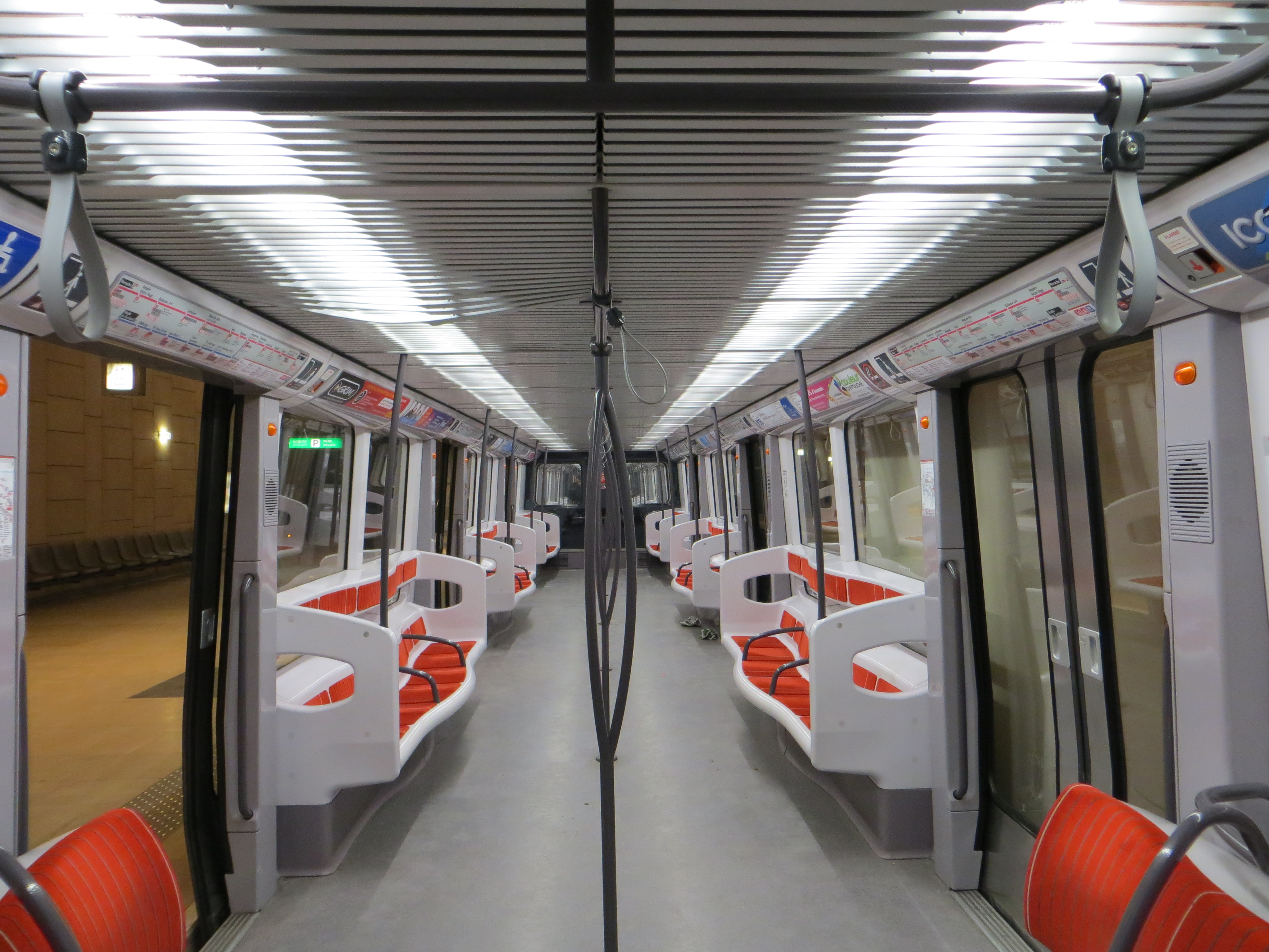 Vue intérieure d'une rame MPL75 du métro de Lyon rénovée en 2012 avec nouvelle disposition des sièges